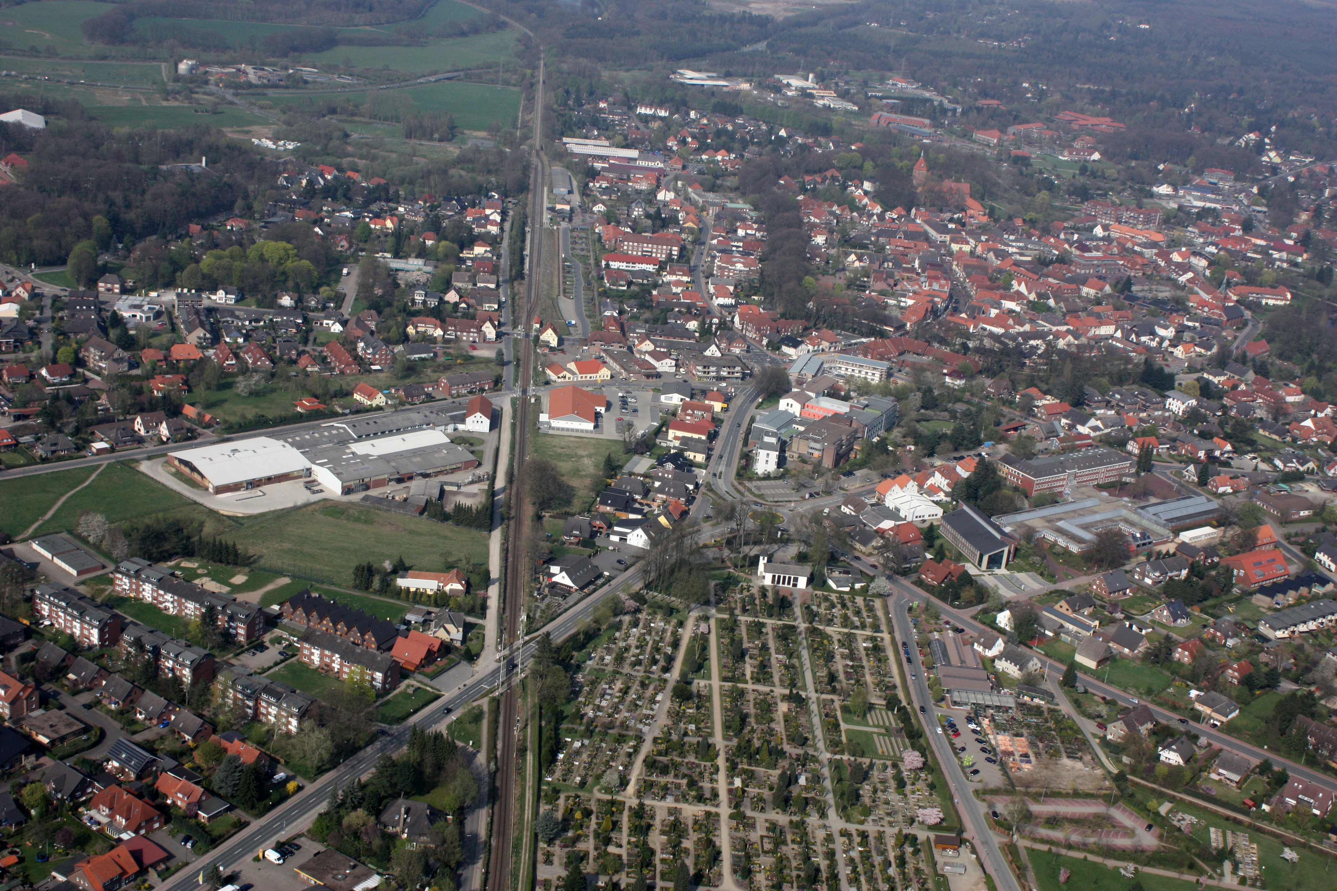 Wildeshausen, Landkreis Oldenburg, Niedersachsen